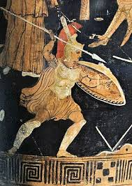 ಕನ್ನಡ: ಚಿತ್ರ